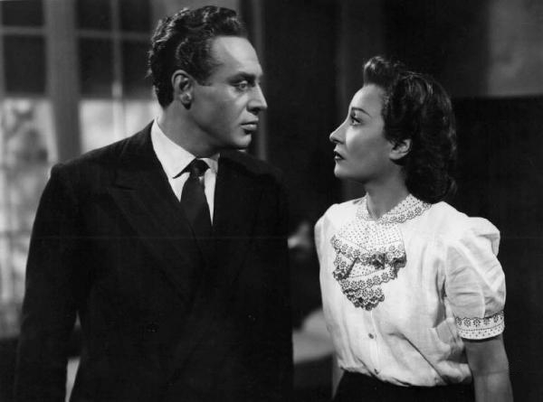 Una scena del film Amanti senza amore